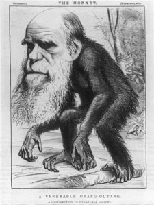 Zeitungsbild anno 1871, gemeinfei